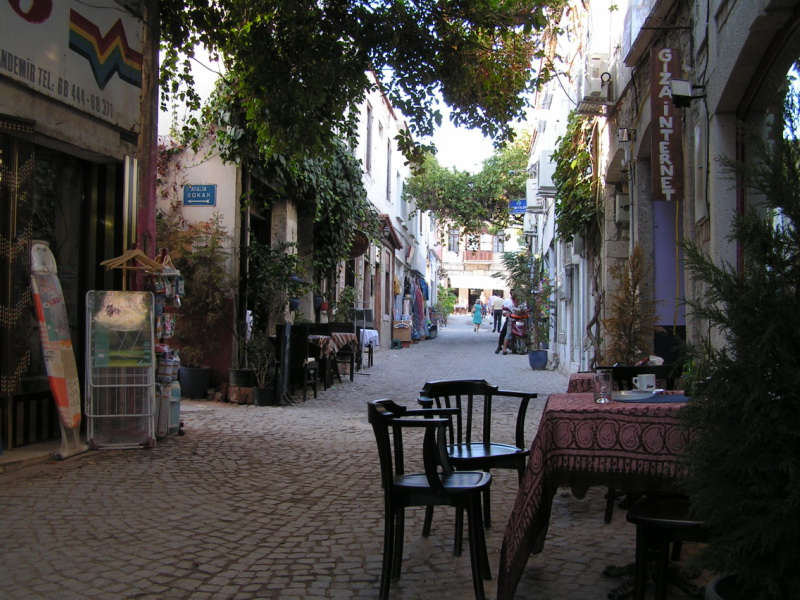 Street in Alaçatı